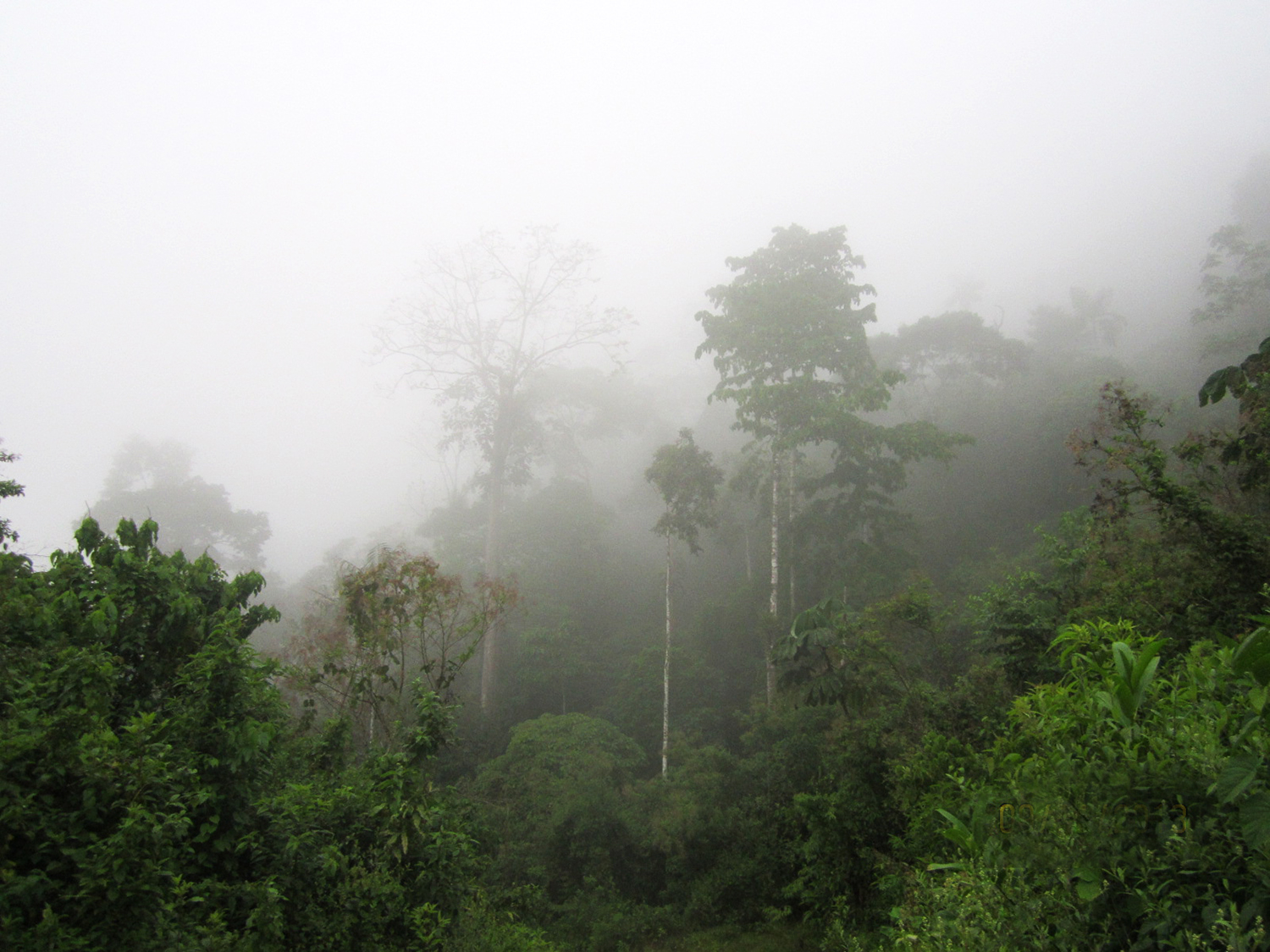 Bosque con nubes